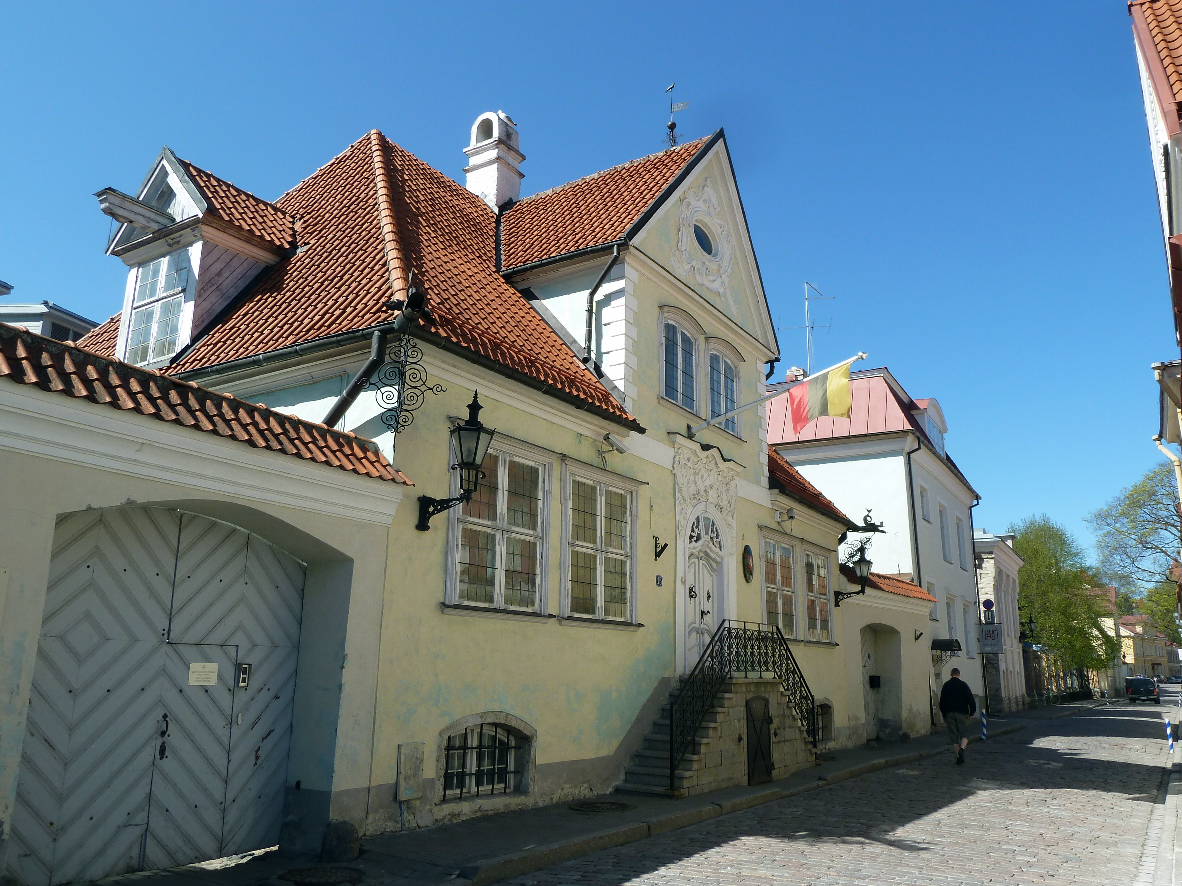 Lietuvos Respublikos ambasada